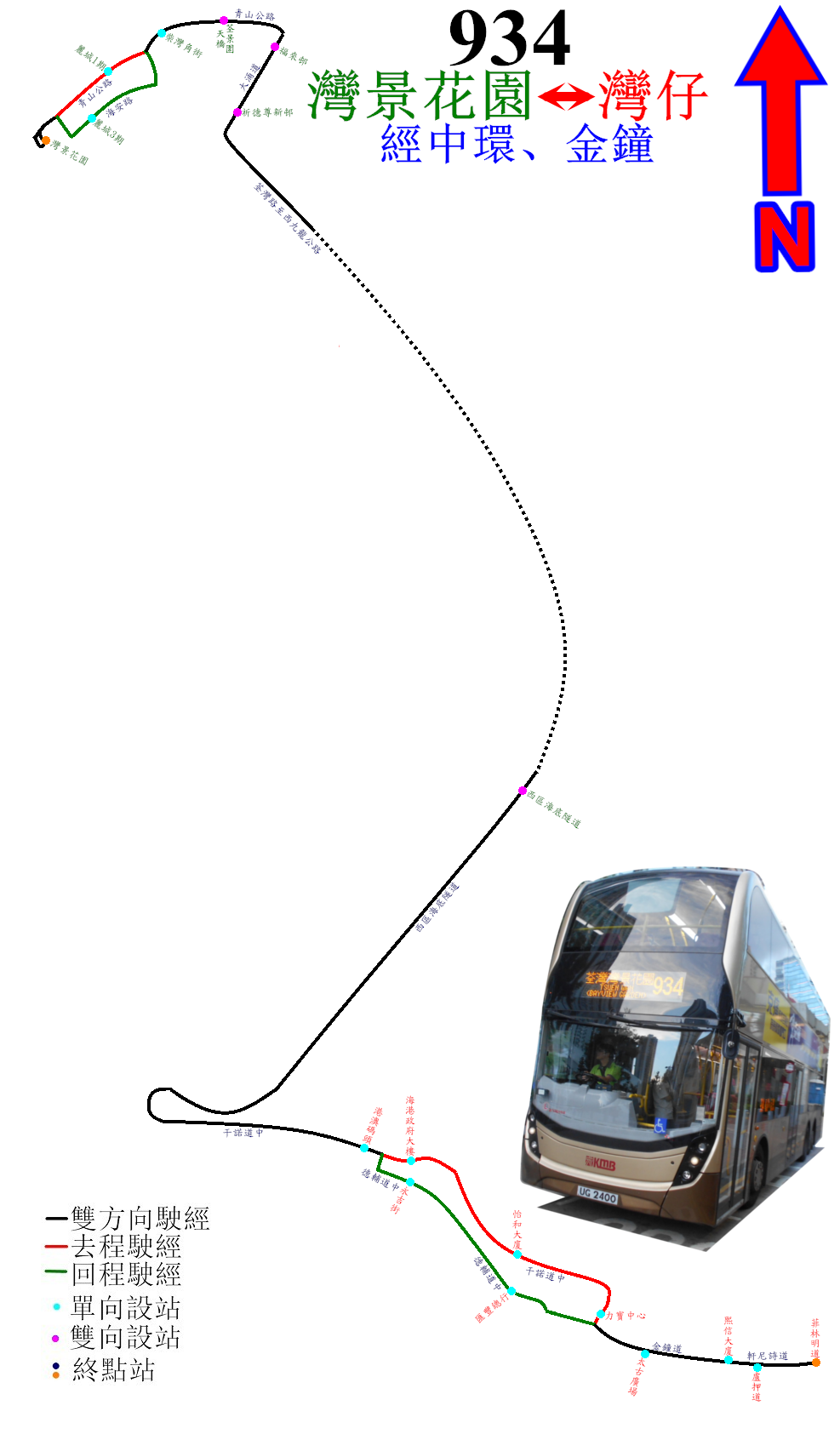 中文（香港）: 過海隧巴934線的走線圖